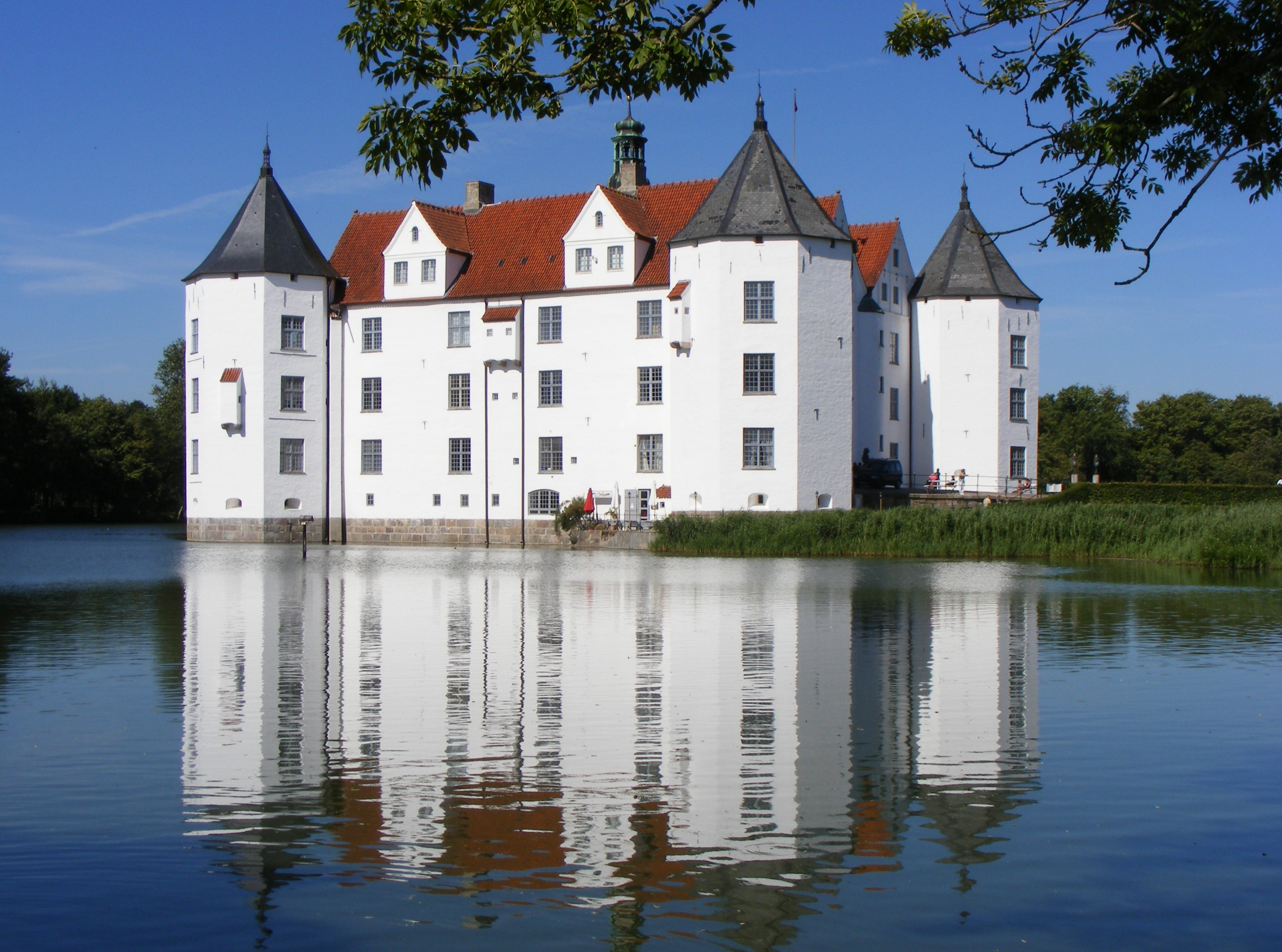 Schloss Glückburg, Ansicht von Westen